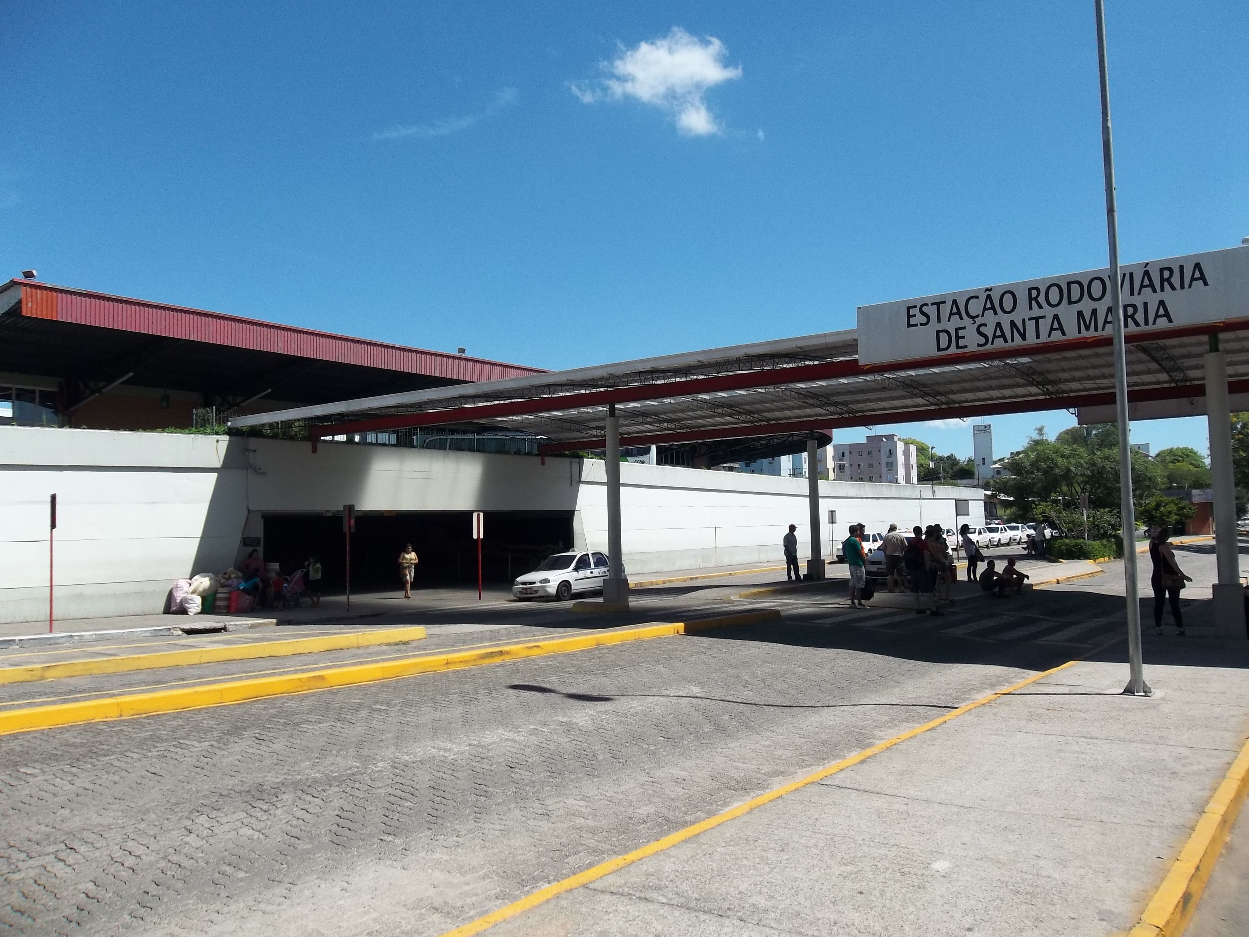 Estação Rodoviária de Santa Maria. Entrada, NS Lourdes, Sede, Santa Maria, Rio Grande do Sul, Brasil.